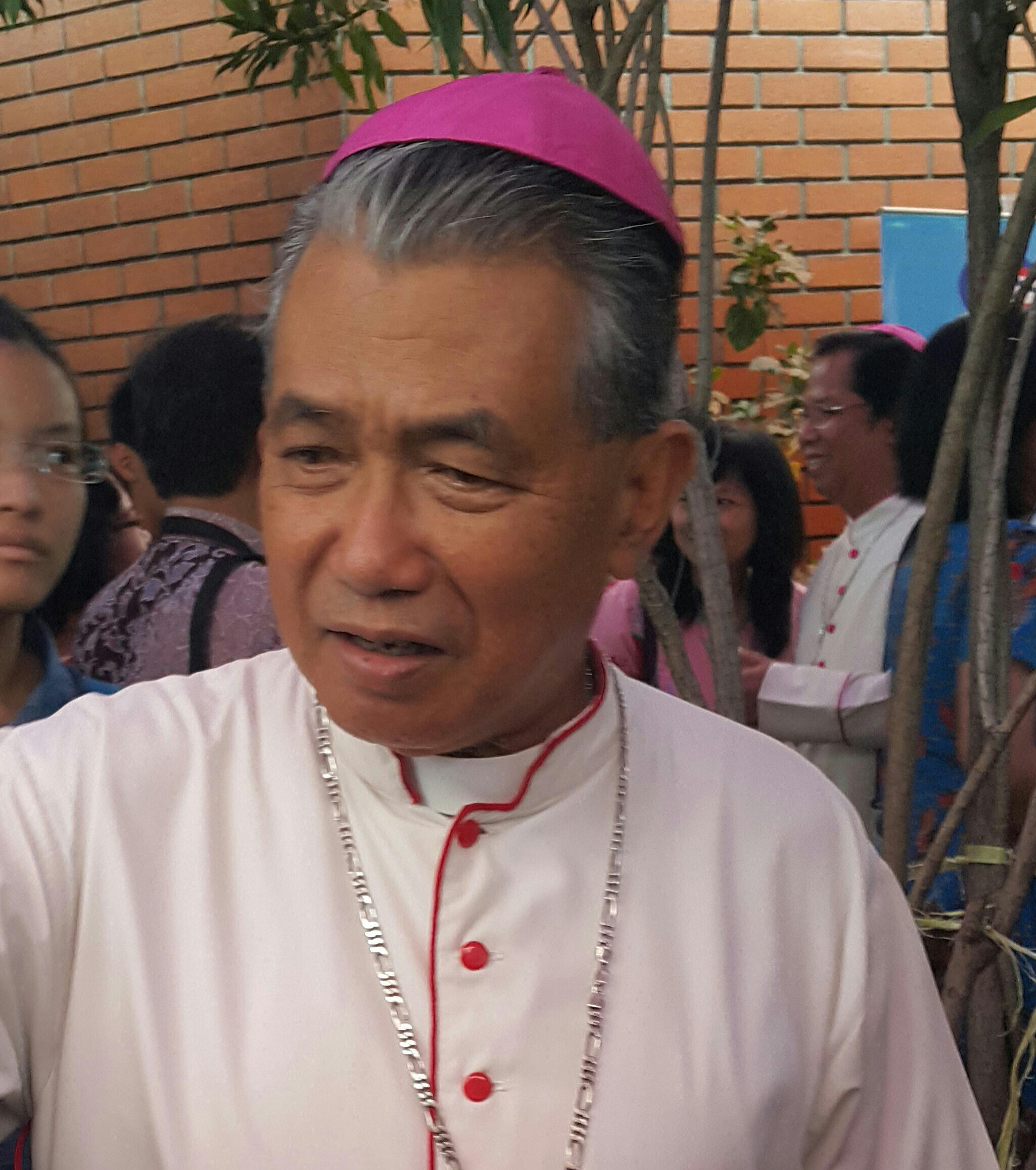 Mgr. Agustinus Agus, Uskup Agung Pontianak